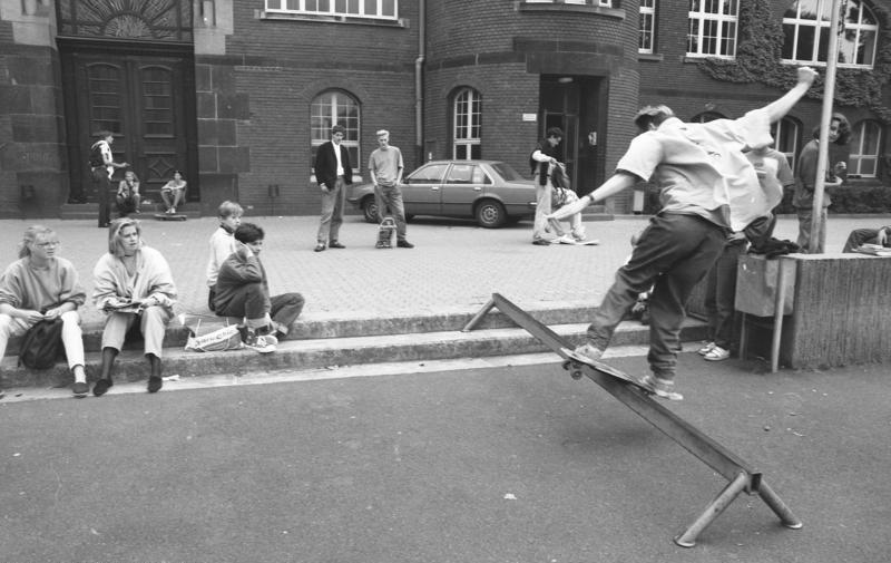 Juni 1988 Bonn: Gymnasium- Schüler in der Pause